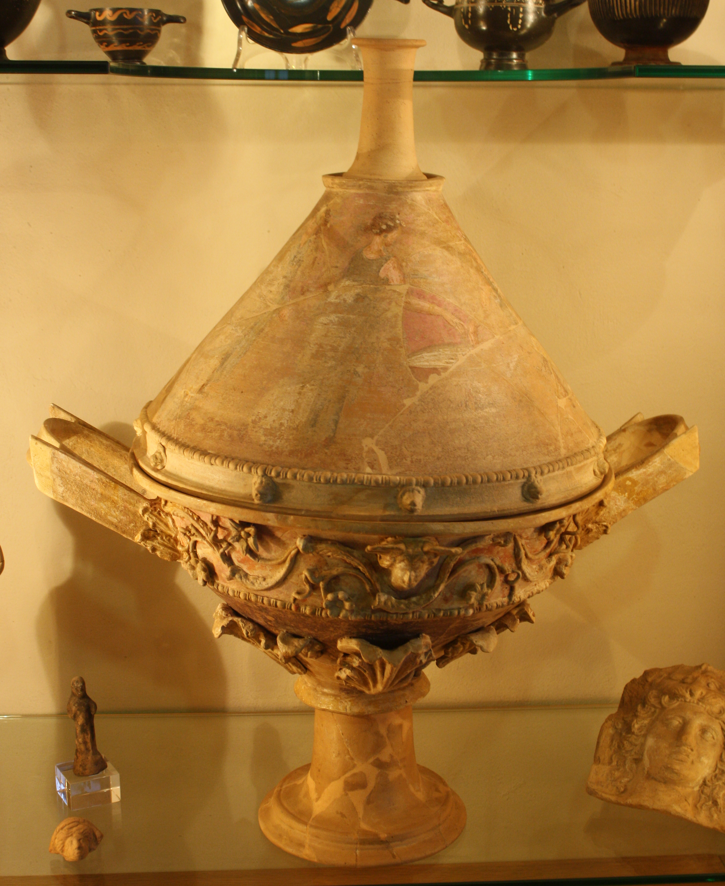 Lekanis databile al III secolo a.C.